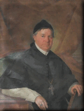 Valentin Michael Schopper (1771 - 1857), Římskokatolický duchovní a opat kláštera cisterciáků ve Vyšším Brodě.